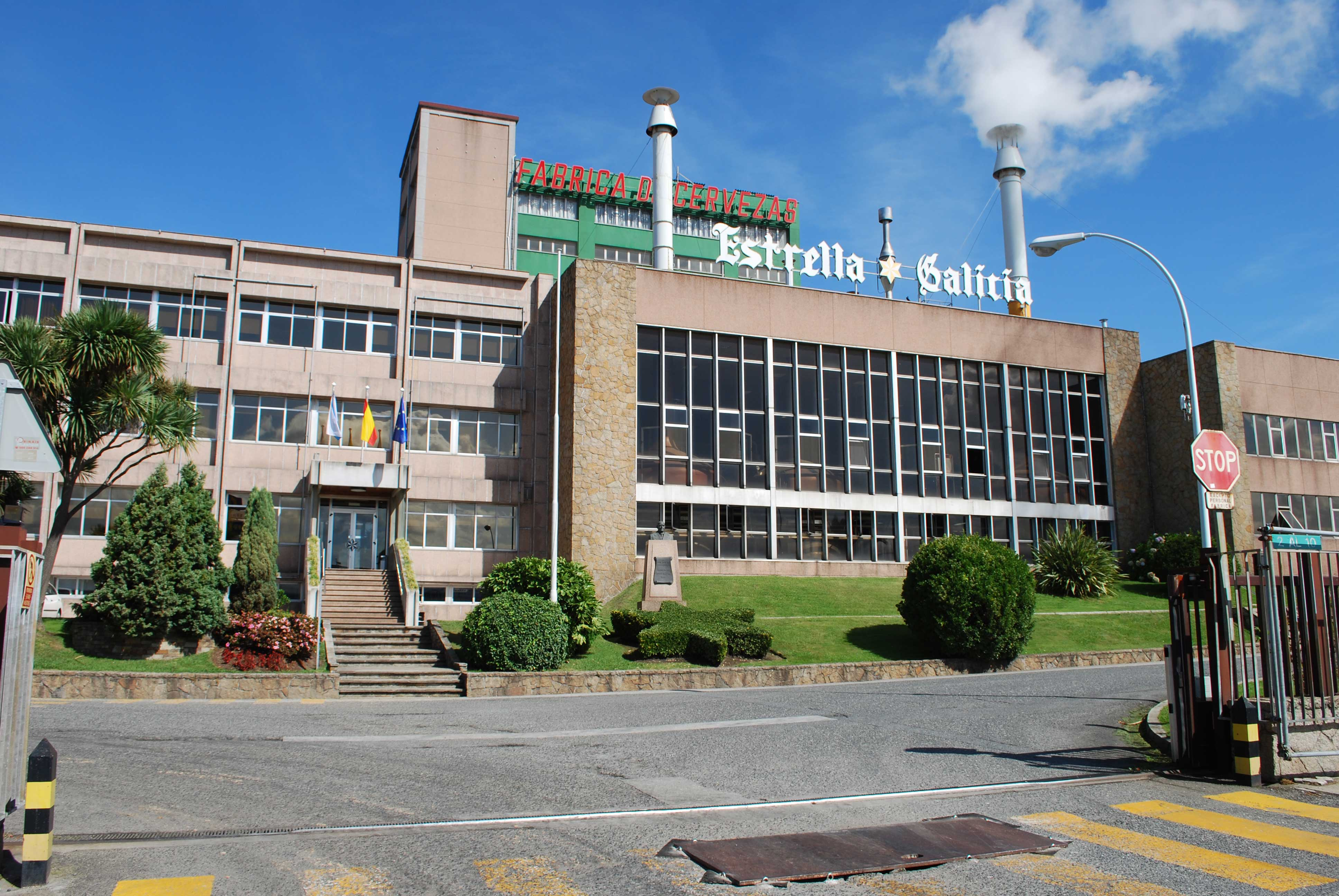 Fábrica de Estrella Galicia en Agrela, A CoruñaGalego: Fábrica de Estrella Galicia en Agrela, A Coruña